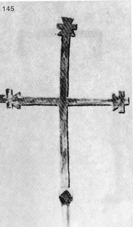 145. Кръст-свещник из църквата „Св. Никола", с. Гложене, Тетевенско. Изработен е от меко желязо. Четирикрилен; горните му три крила са разширени (с нарези на кукла); долното базира на многоъгълна ябълка, продължава надолу в колонка с подставка. Изработен е през 1836 г., когато е била обновена църквата. Размери на кръста до ябълката: 30x20 см; дебелина на крилата 1 см и дебелина на краищата им 0,5 см. Скициран на 12Ж.1916 г. (Т. 5, обр. 42.)